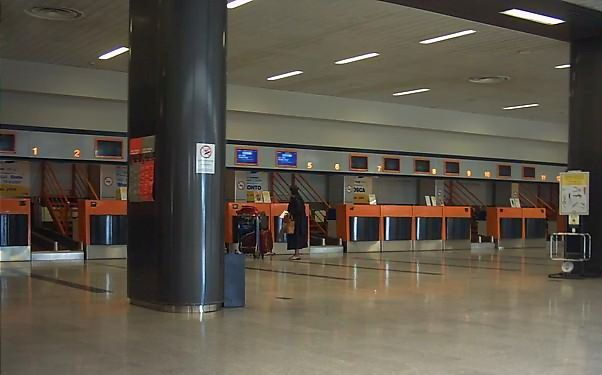 Autore: Mattiussi Fonte: Personale Descrizione: Area check in